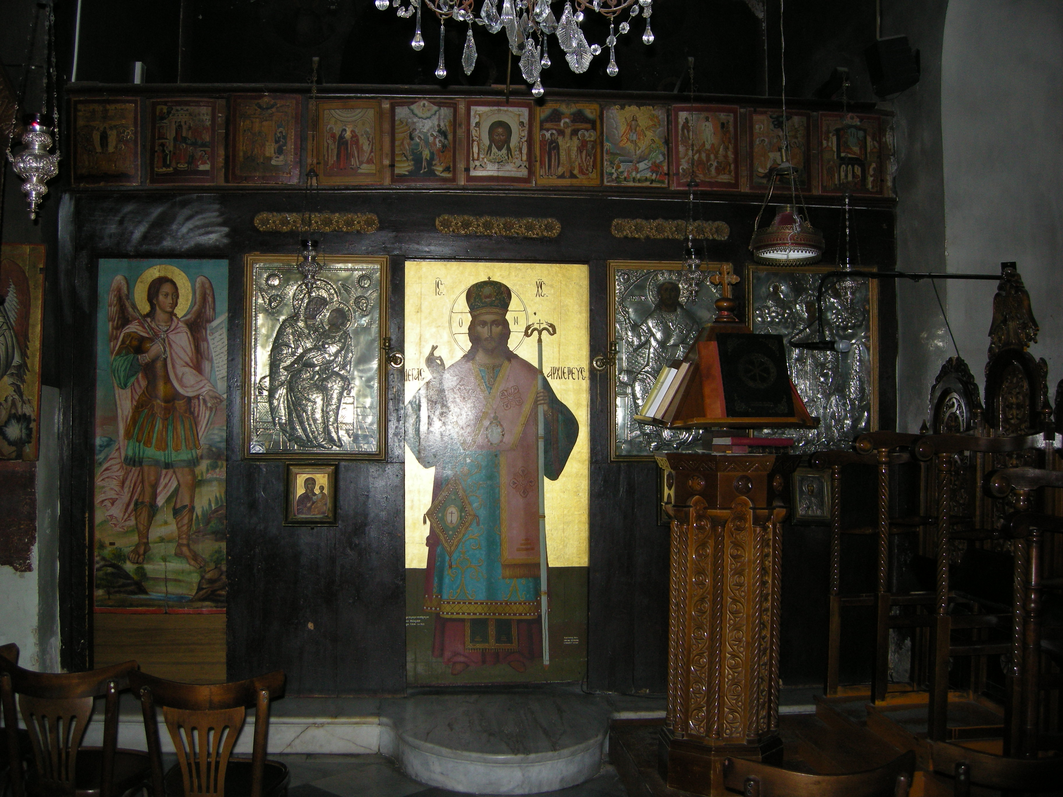 Agios Nikólaos Ragavás, inside